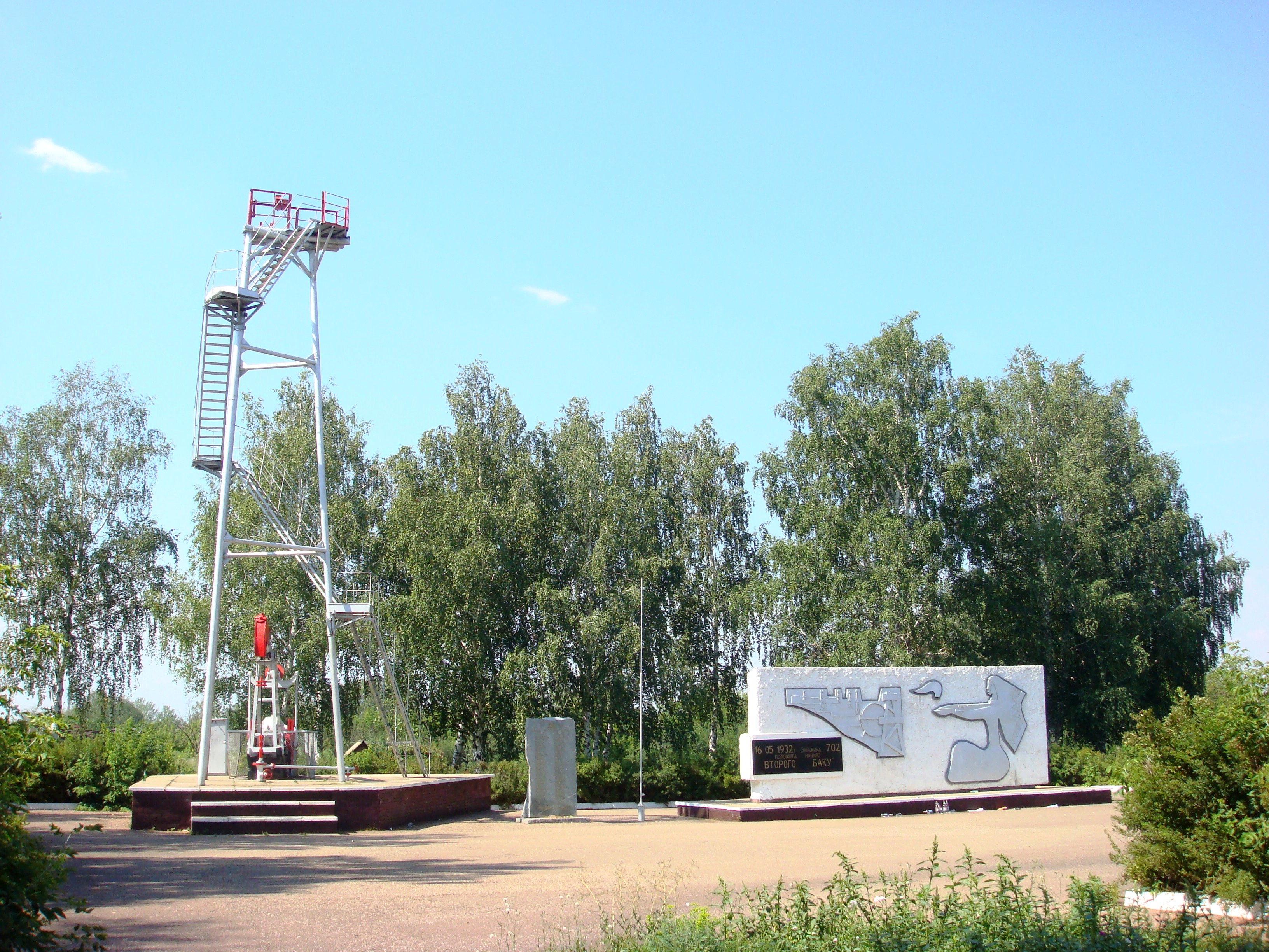 Скважина №702